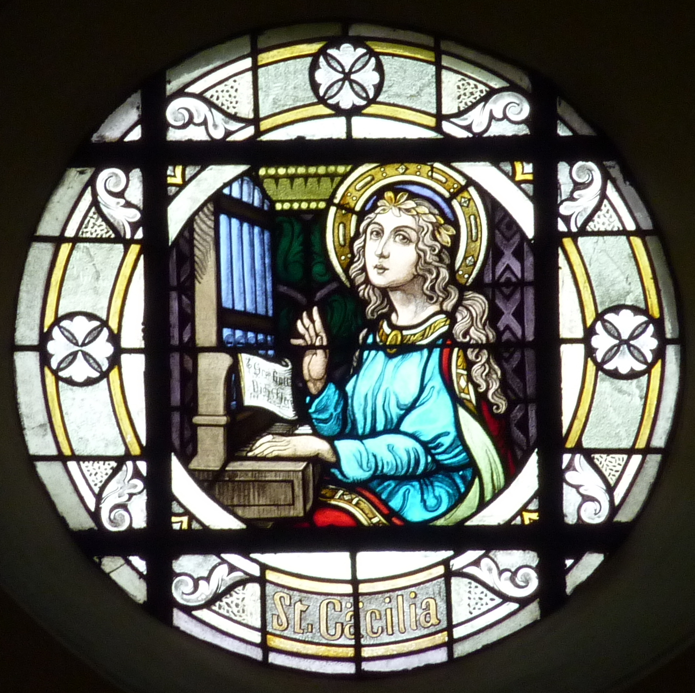 Bleiglasfenster in der katholischen Pfarrkirche St. Servatius und Dorothea in Müllenbach, Darstellung: hl. Cäcilia, Herstellung: Glasmalerei H. Maier in Bad Neuenahr (siehe Karl Egon Siepmann: Pfarrkirche St. Servatius und Dorothea Müllenbach. In: Die Kirche mitten im Ort. Kirchen und Kapellen in der Verbandsgemeinde Adenau, hrsgg. von der Verbandsgemeinde Adenau, Adenau 2001, S. 85−86, ISBN 3-9804818-5-9)